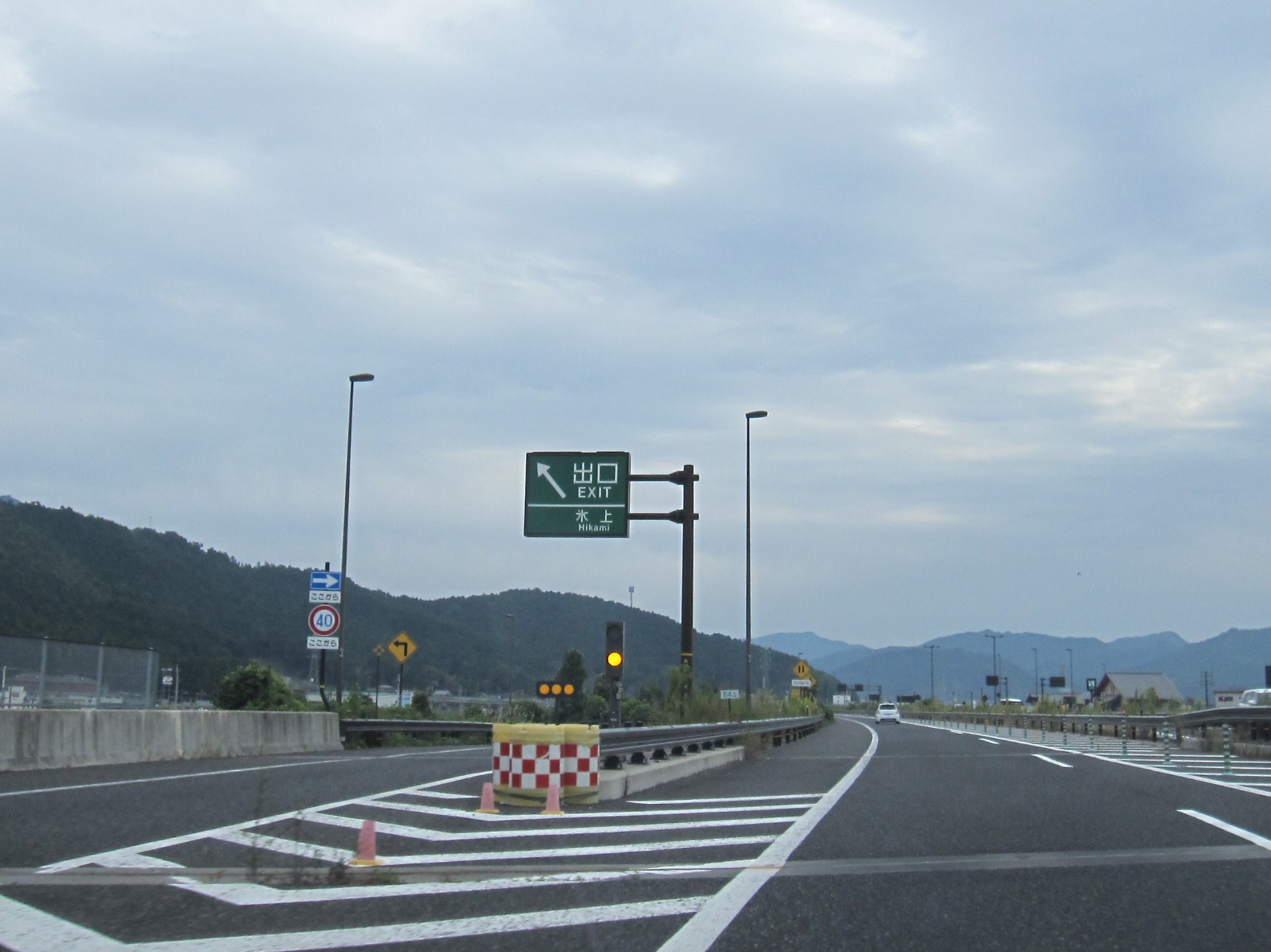 氷上インターチェンジ